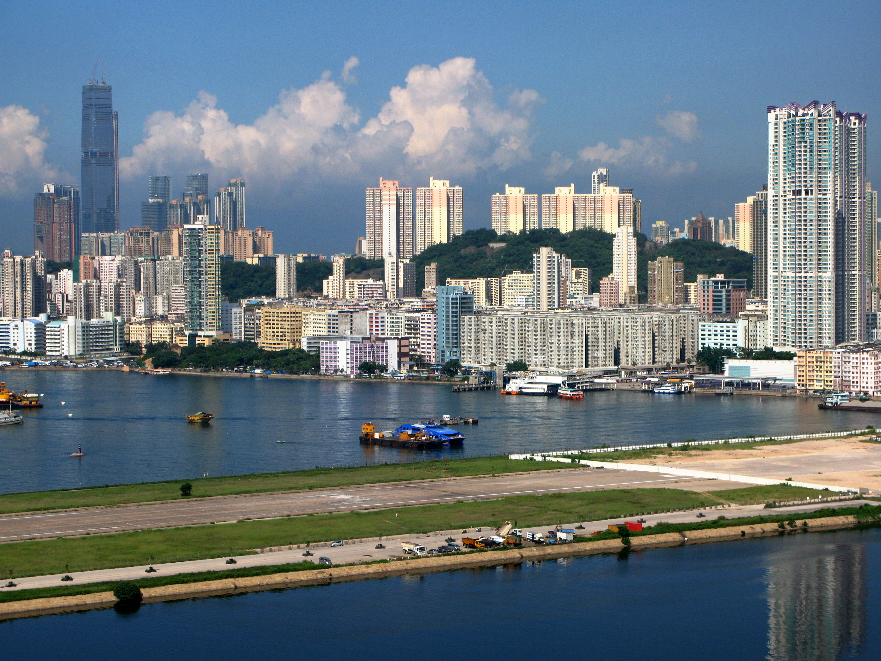 To Kwa Wan 土瓜灣